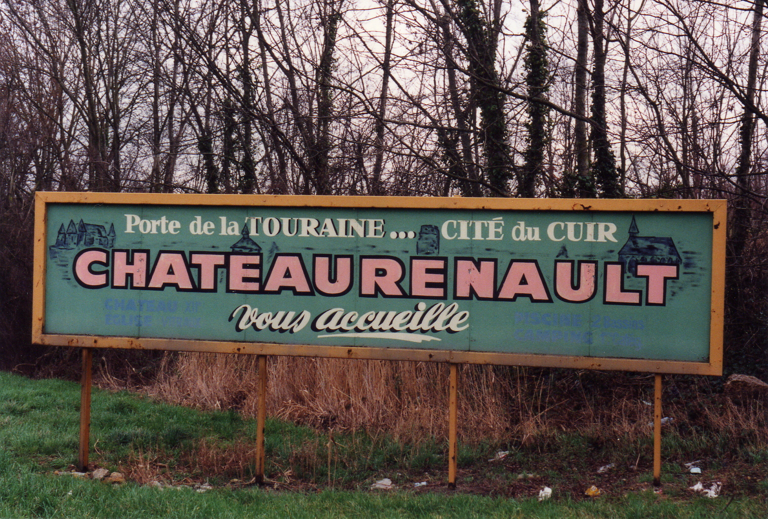 Elle indique :"Château-Renault Porte de la Touraine la cité du cuir" elle est situé sur la route de la national 10